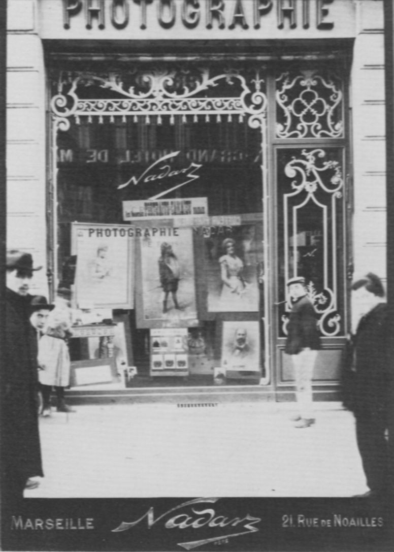 Tournachon, Gaspard-Félix: Nadars Atelier in Marseille